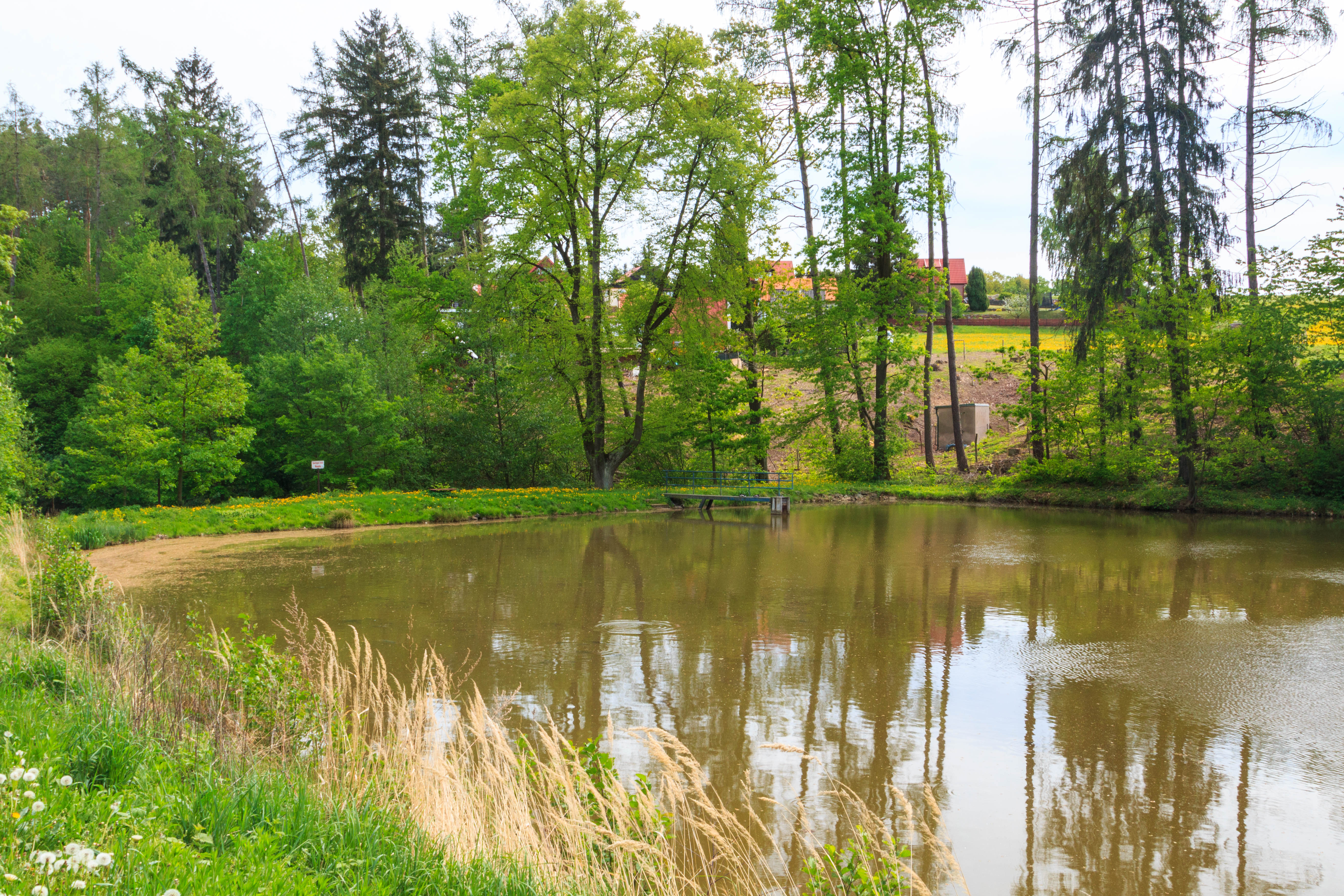 Rybník Houska u Konopáče Project: Vodstvo.